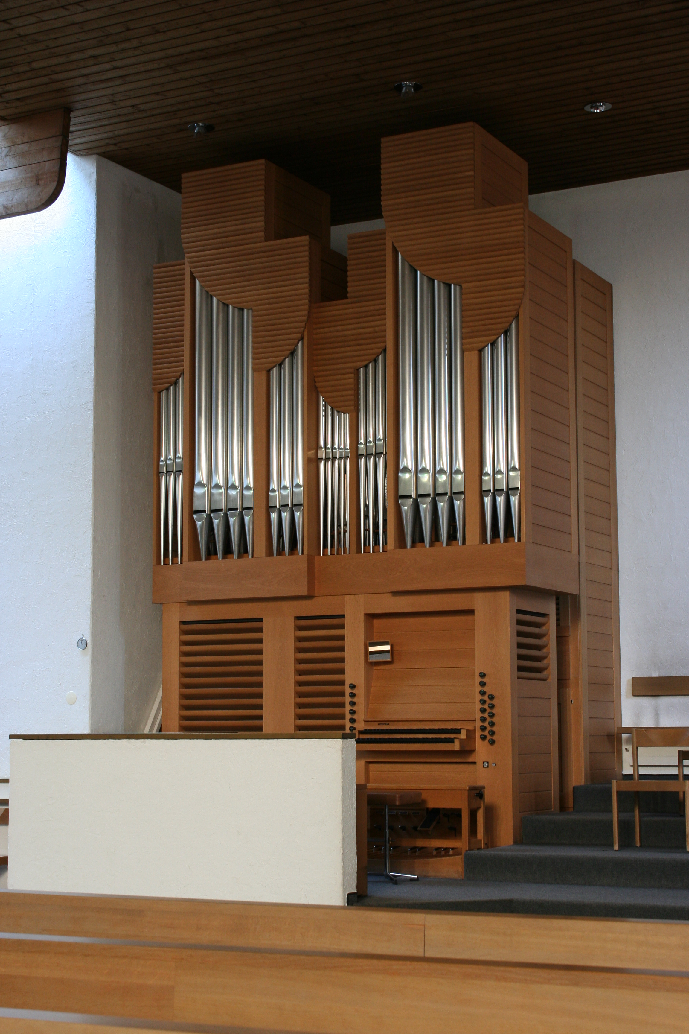 Römisch-katholische Pfarrikirche St. Niklaus Hombrechtikon, Orgel